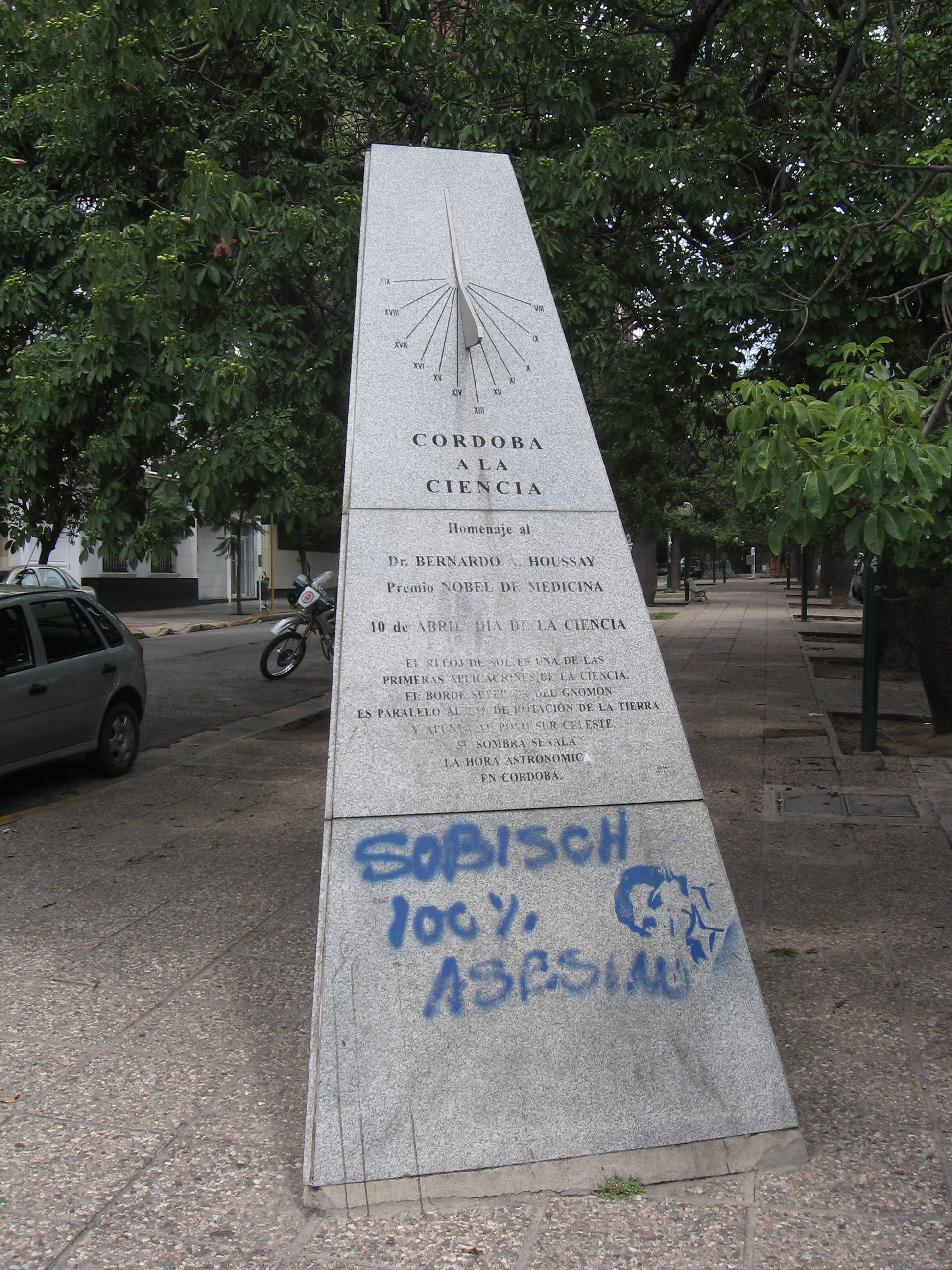 Reloj de Sol en la ciudad de Córdoba, homenaje a Bernardo Houssay